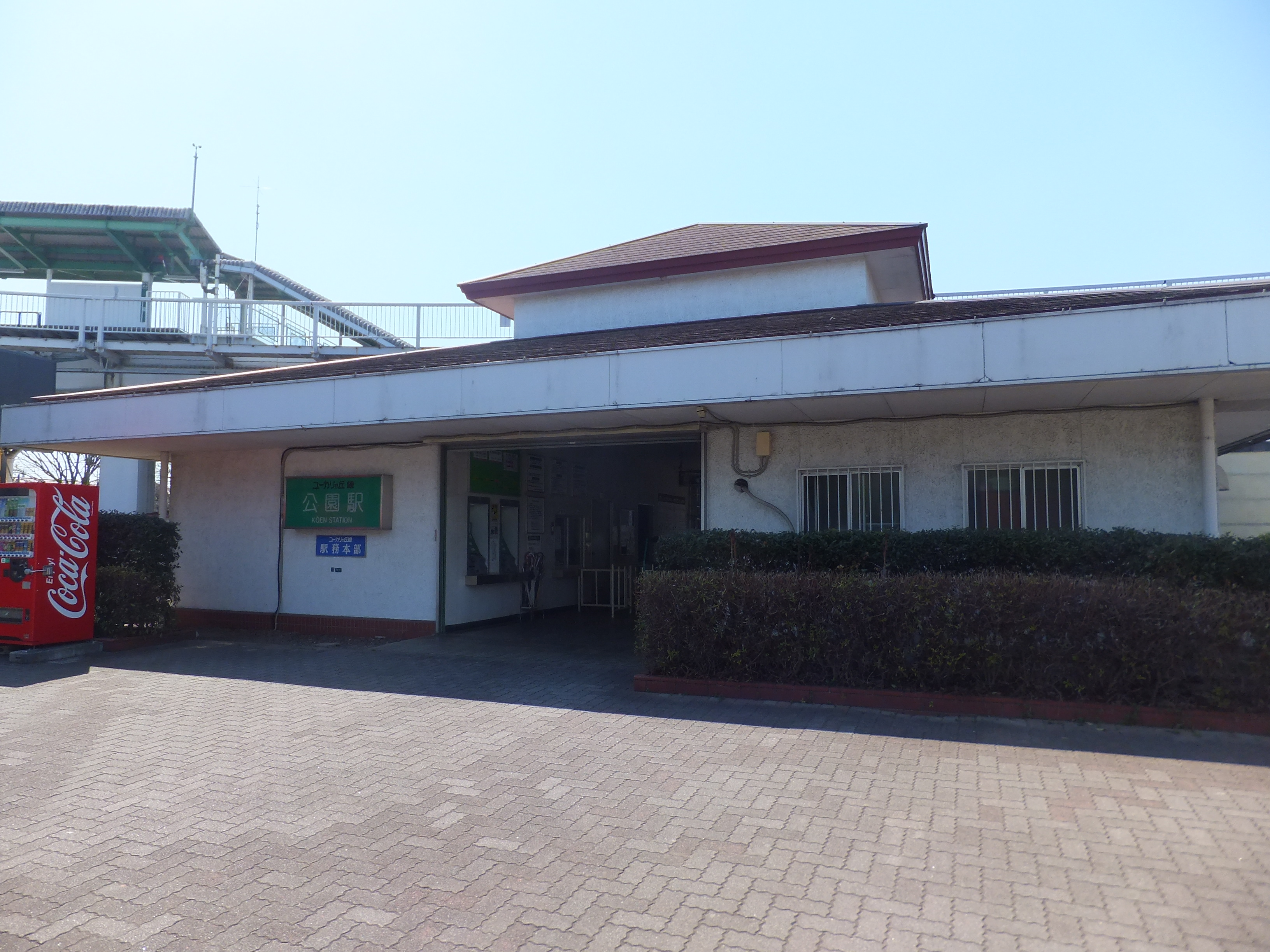 山万ユーカリが丘線公園駅駅舎。ユーカリが丘線駅務本部がある。